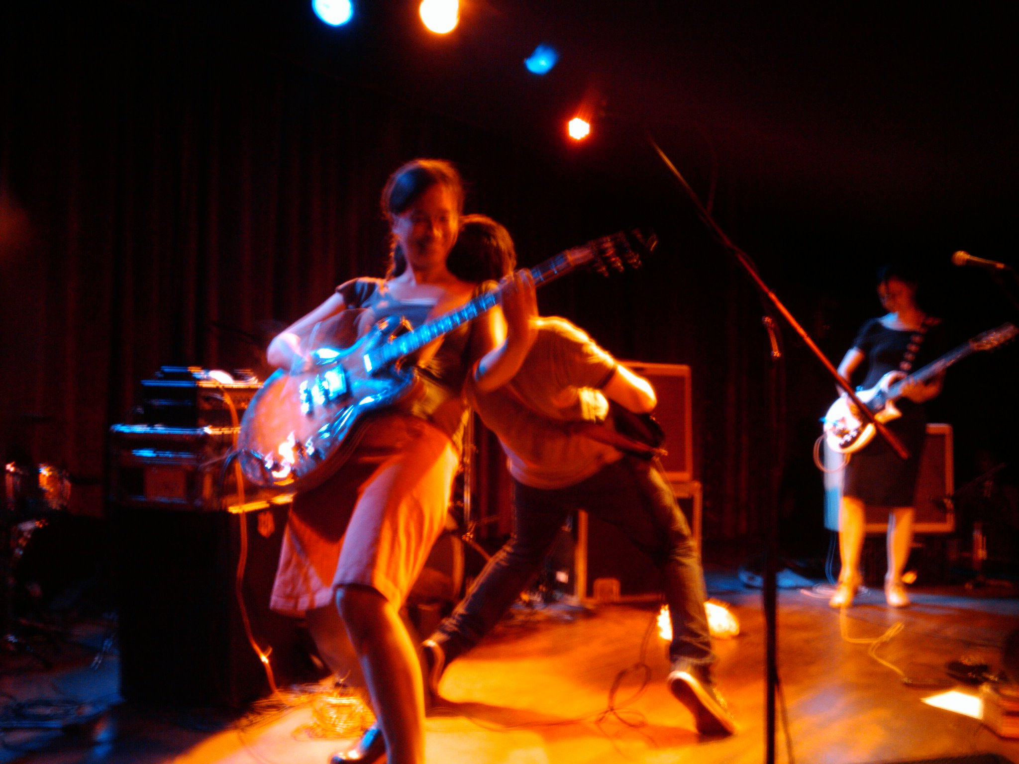 Tuscadero